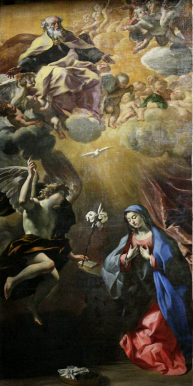 La obra representa el momento en que el Arcángel San Gabriel anunció a la Virgen María que sería la madre de Jesucristo, el Mesías.